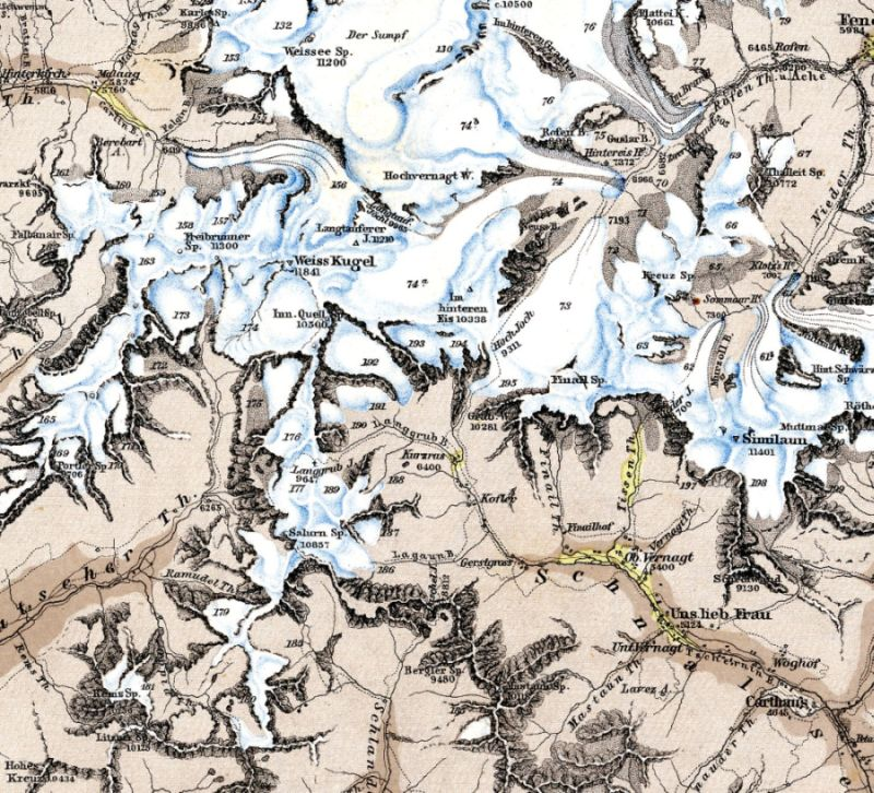 Gletscherkarte der Ötztaler Alpen von Carl Sonklar